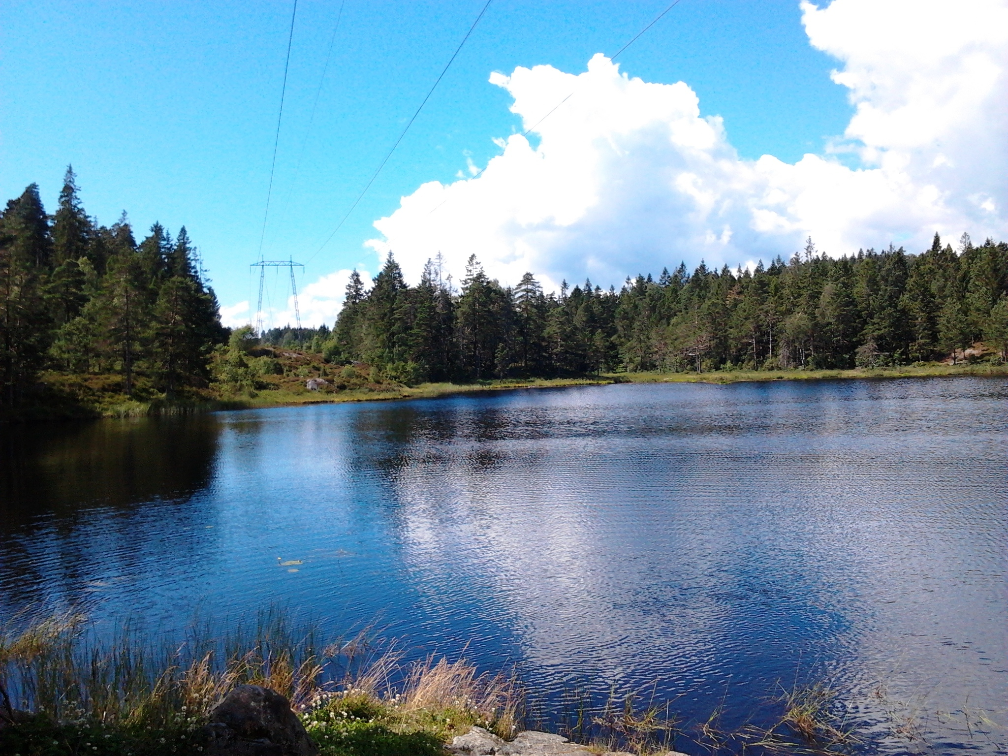 Gjennestadkjenna er et tjern ved Gjennestad i Arendal, gamle Øyestad kommune